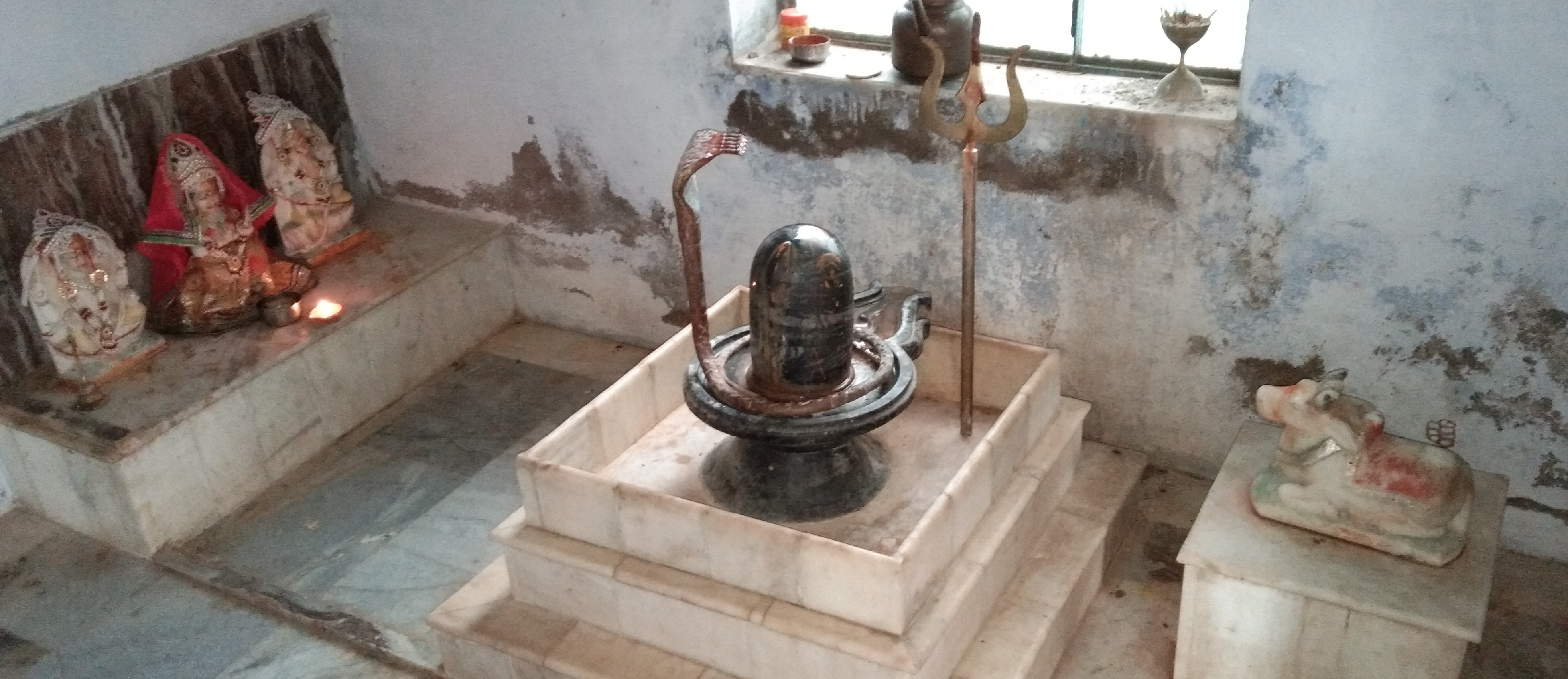 शिवजी परिवार